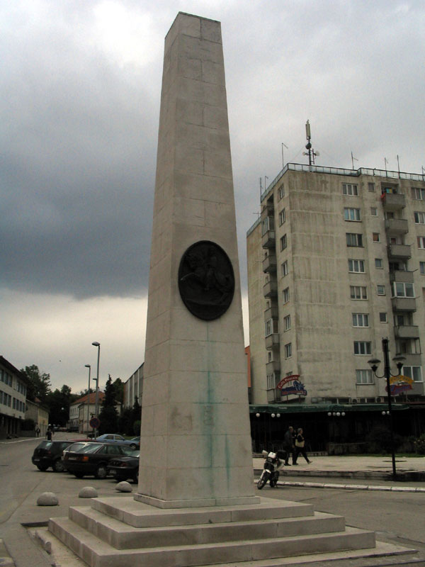 Livno, Bosna i Hercegovina, obelisk iz 1925., ploča